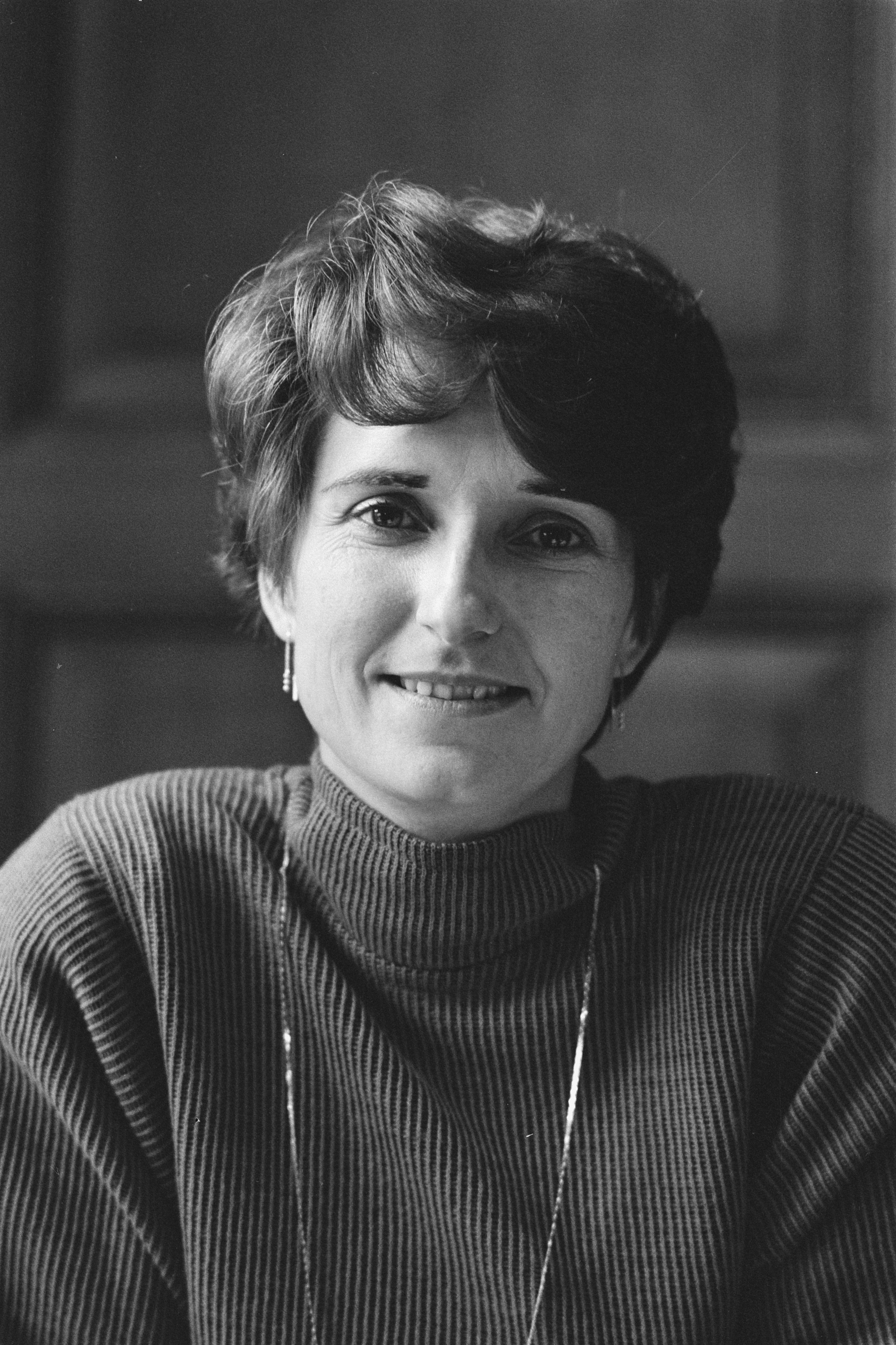 Mevrouw Y. M. T. C. van Rooy begonnen als staatssecretaris van Economische Zaken